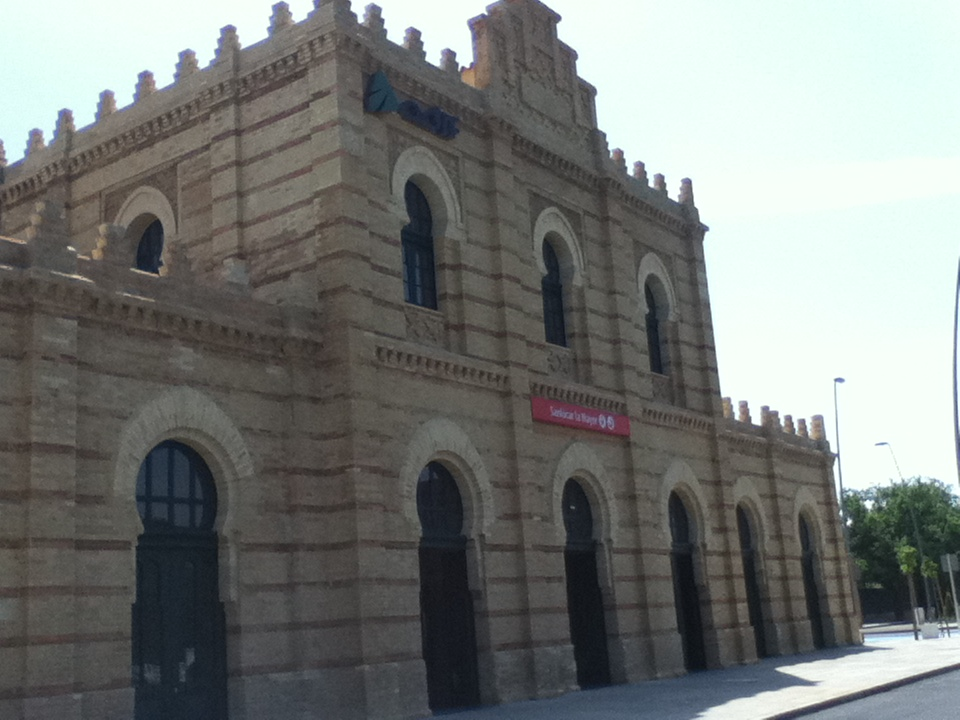 Fachada de la estacion de sanlucar la mayor